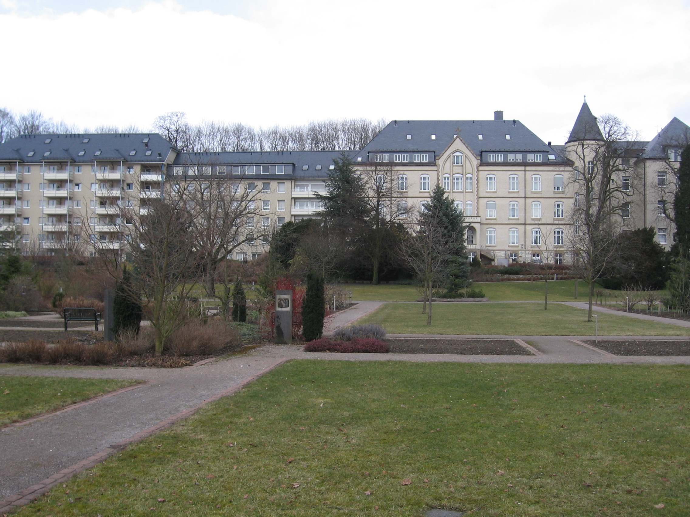 Das Schwesternhaus St. Vincenz im nordrhein-westfälischen Dorf Kirchborchen (Kreis Paderborn) vom Garten des Hauses aus gesehen.